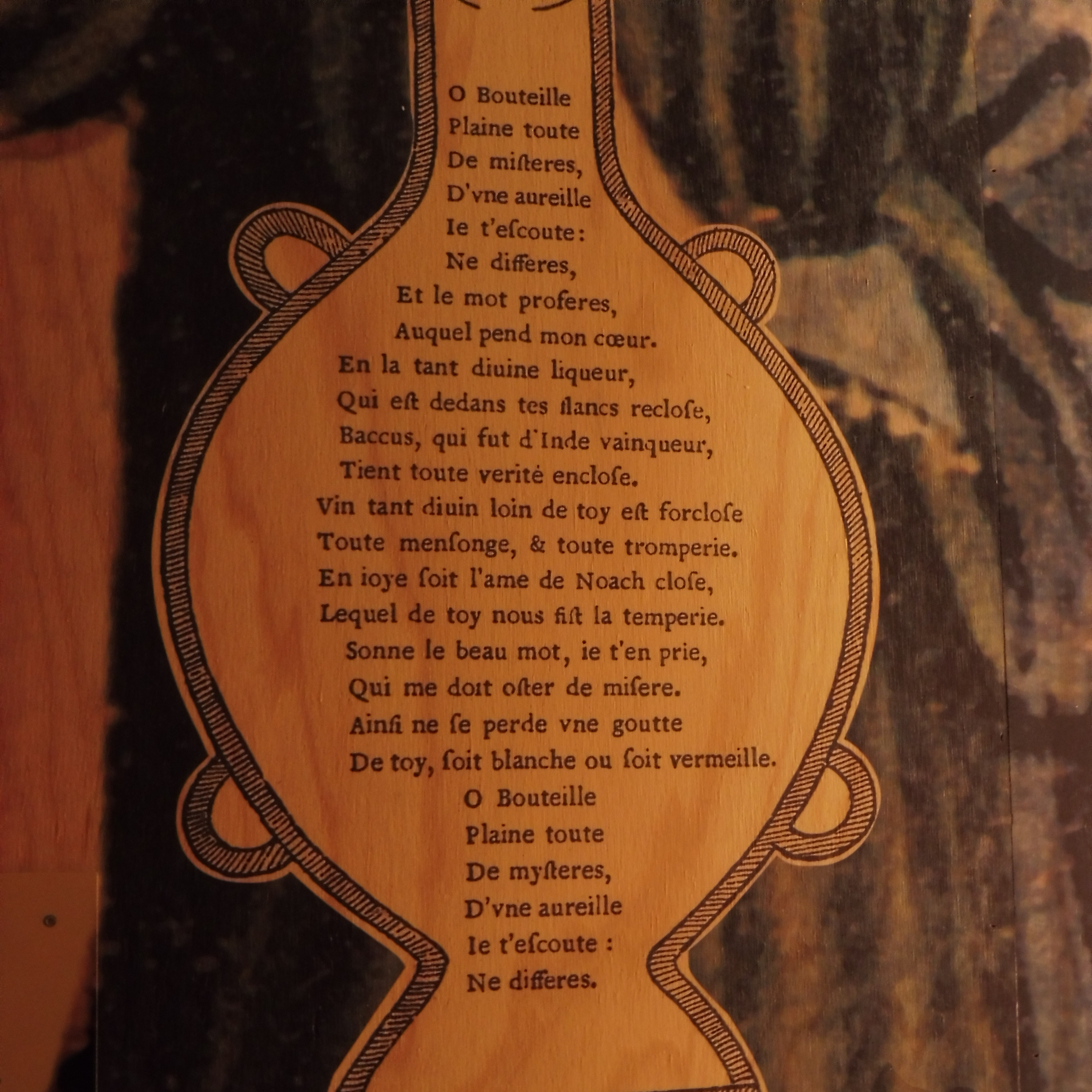 Cité du Vin ː Rabelais, la Dive Bouteille, Cinquième Livre.